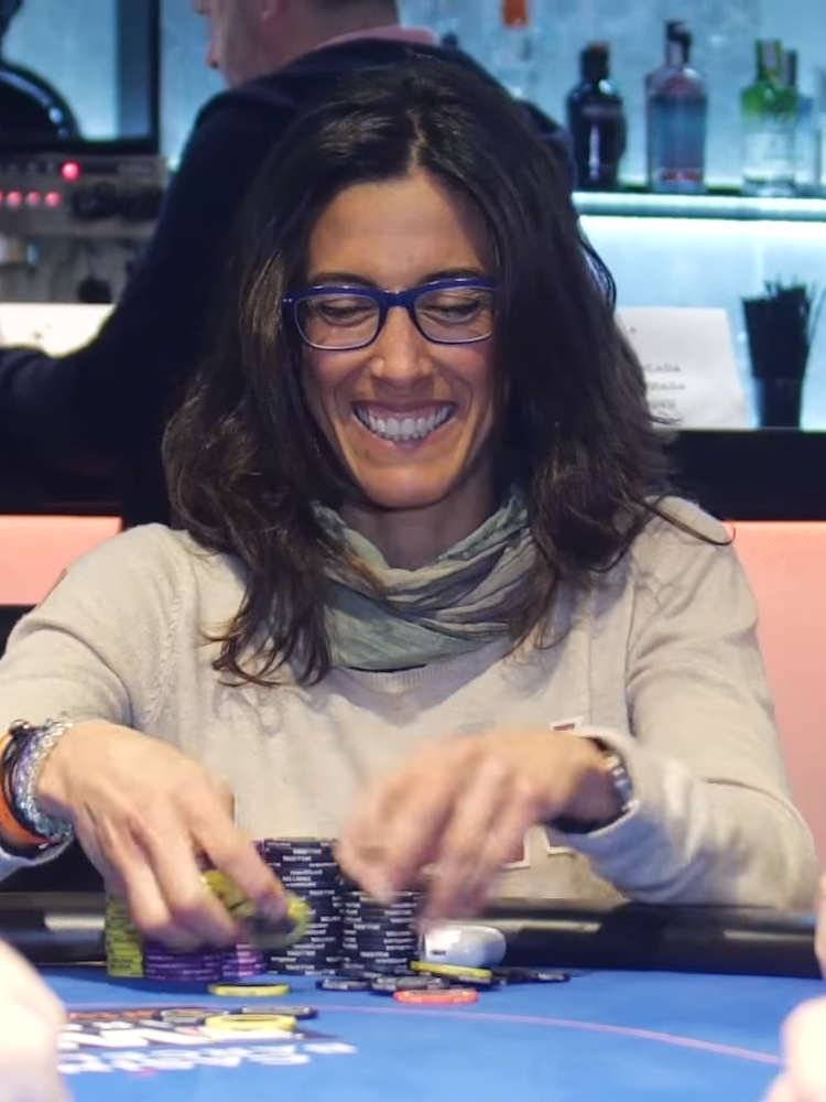 Leo Margets bei der WPT Barcelona